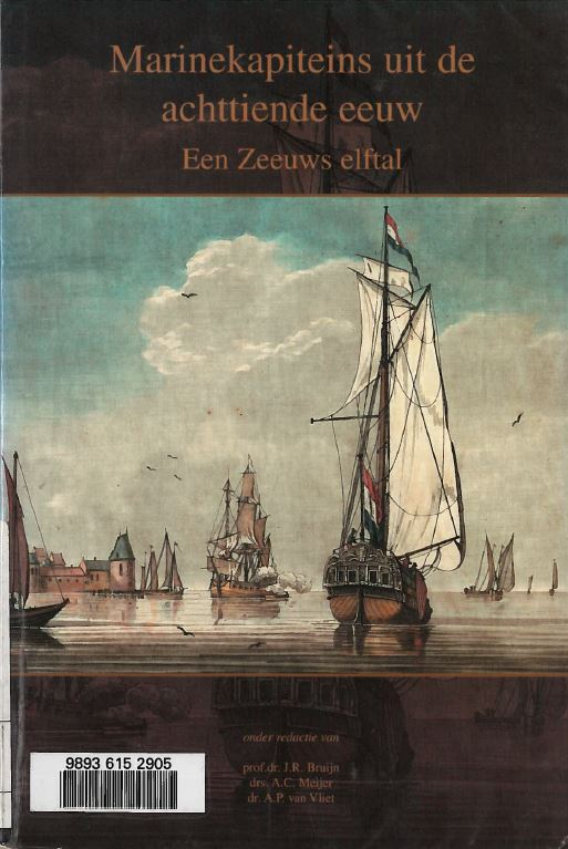 Omslag boek Een zeeuws elftal